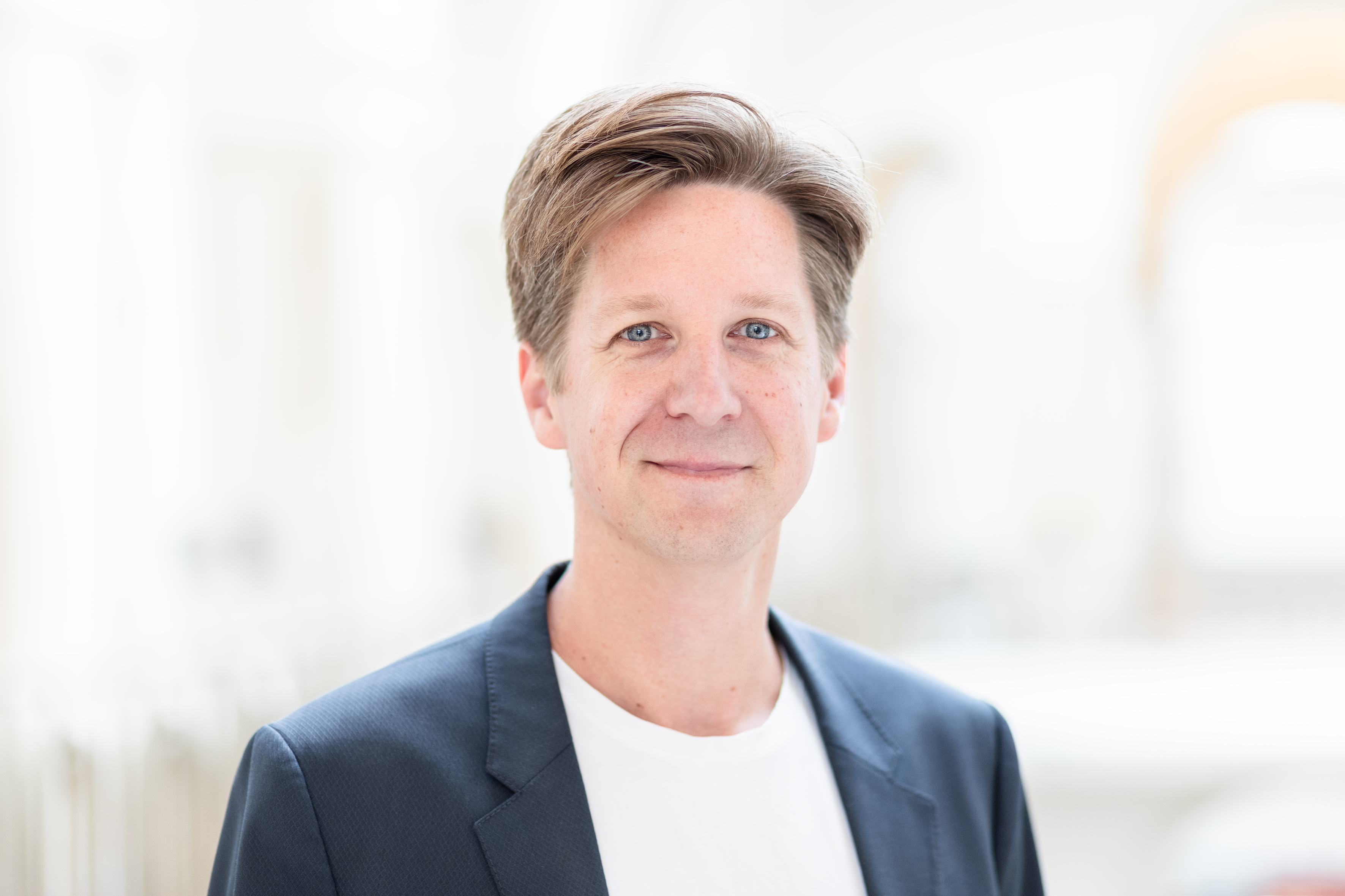 Daniel Wesener, Abgeordneter der Grünen-Fraktion Berlin